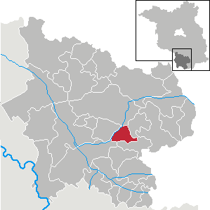 Rückersdorf in Brandenburg (Country) - District Elbe-Elster